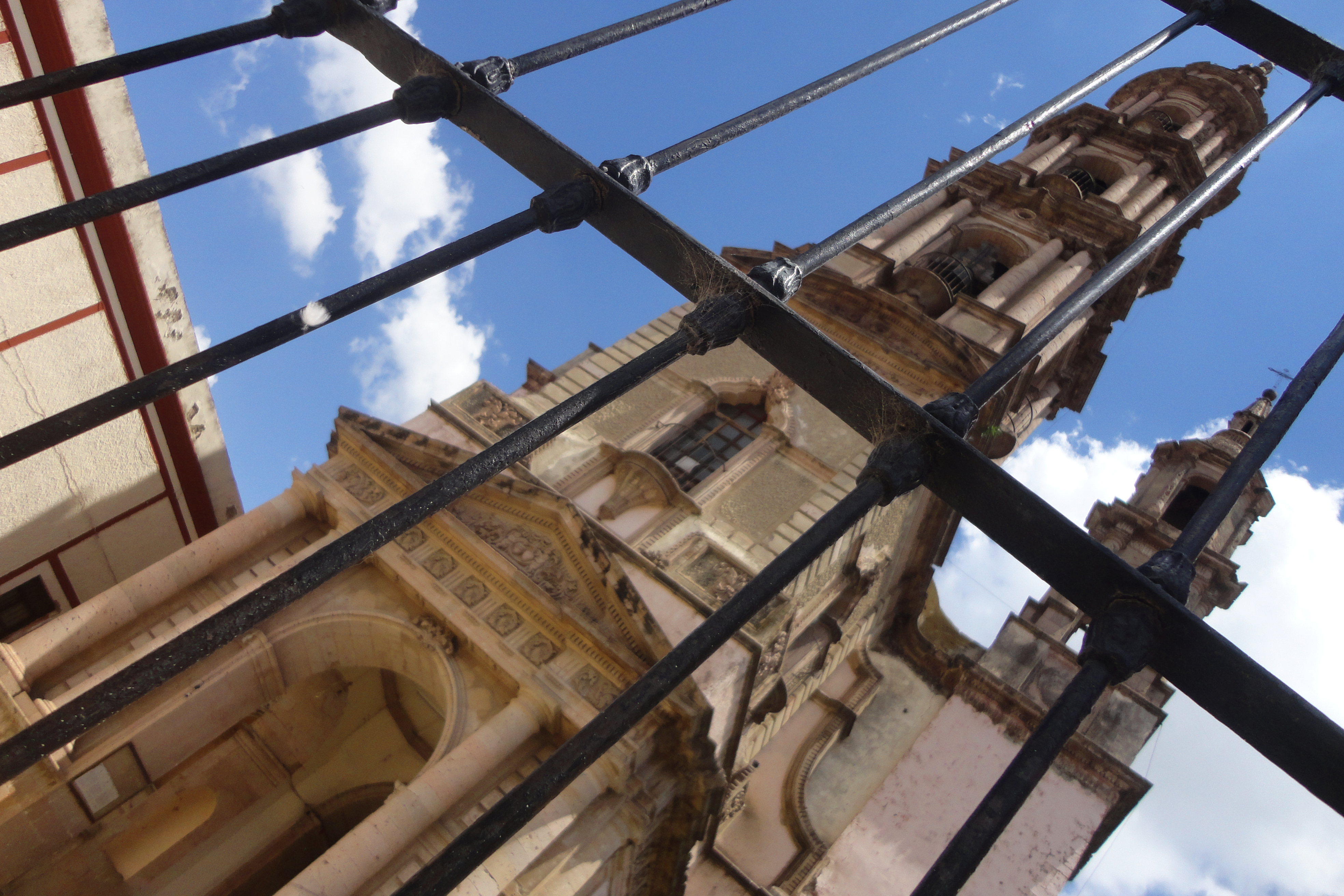 Templo de la Casa de los Ejercicios - Silao, Guanajuato, México